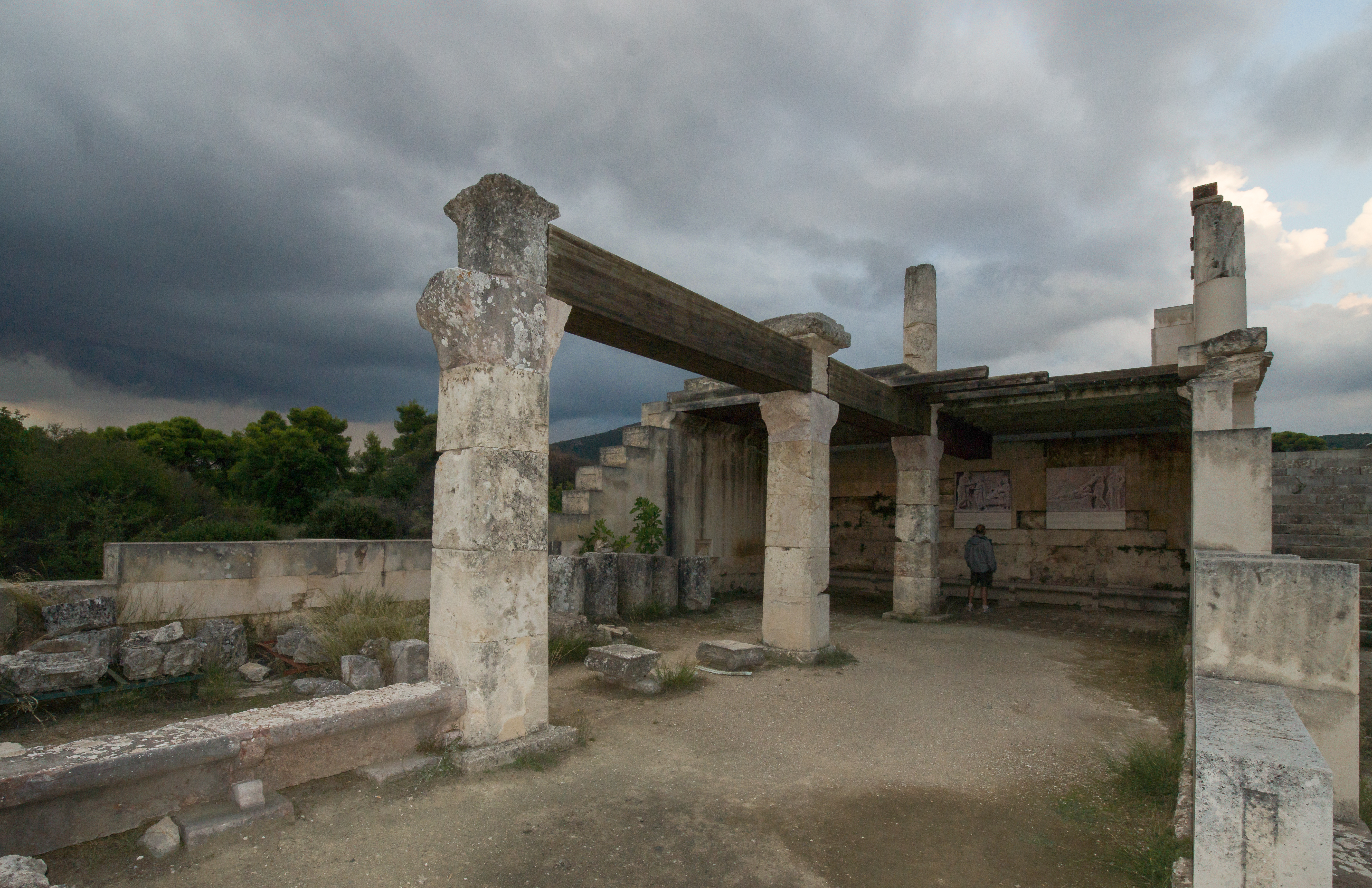 Abaton von Epidauros, Griechenland.